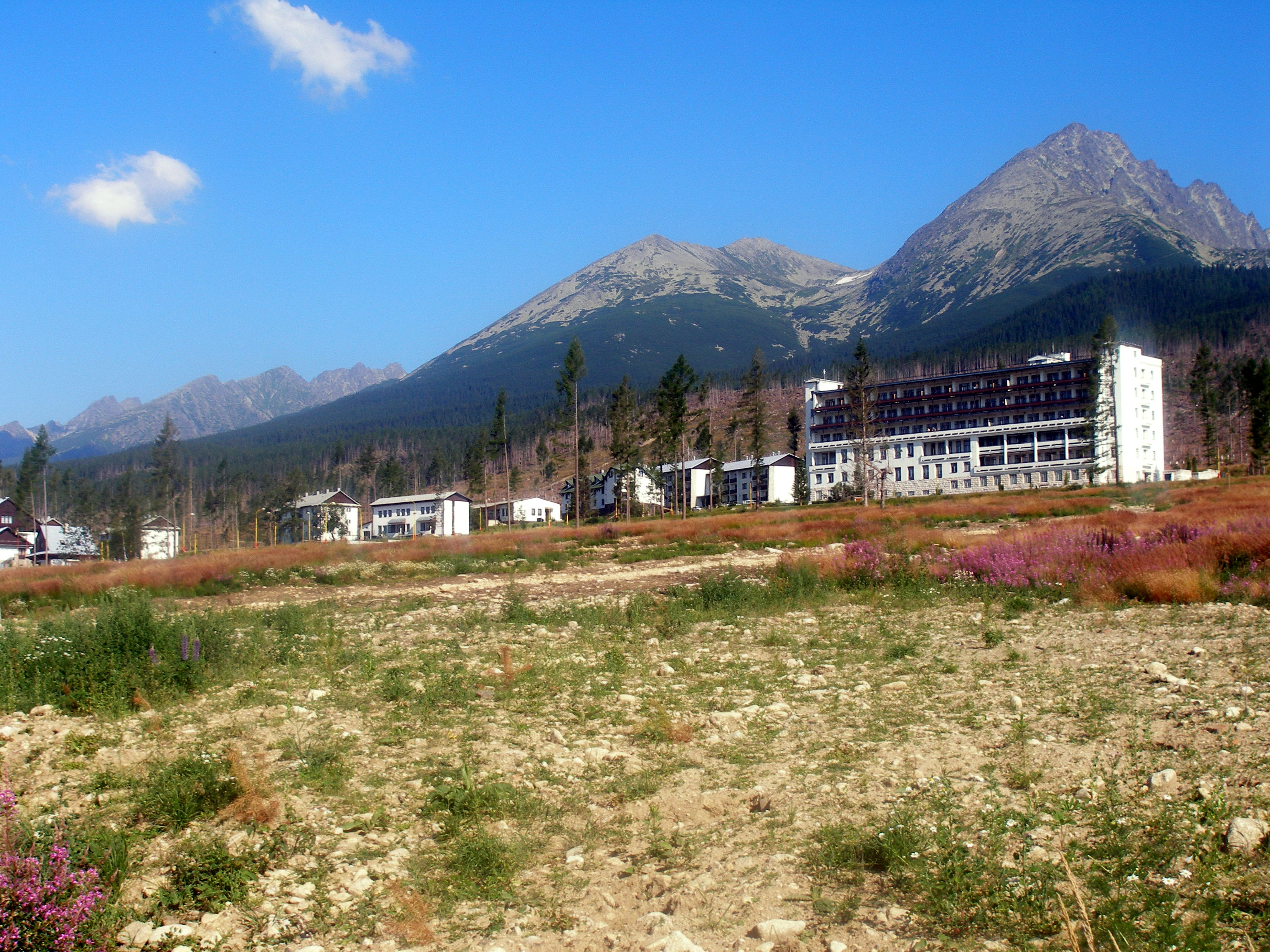 Osada Nová Polianka